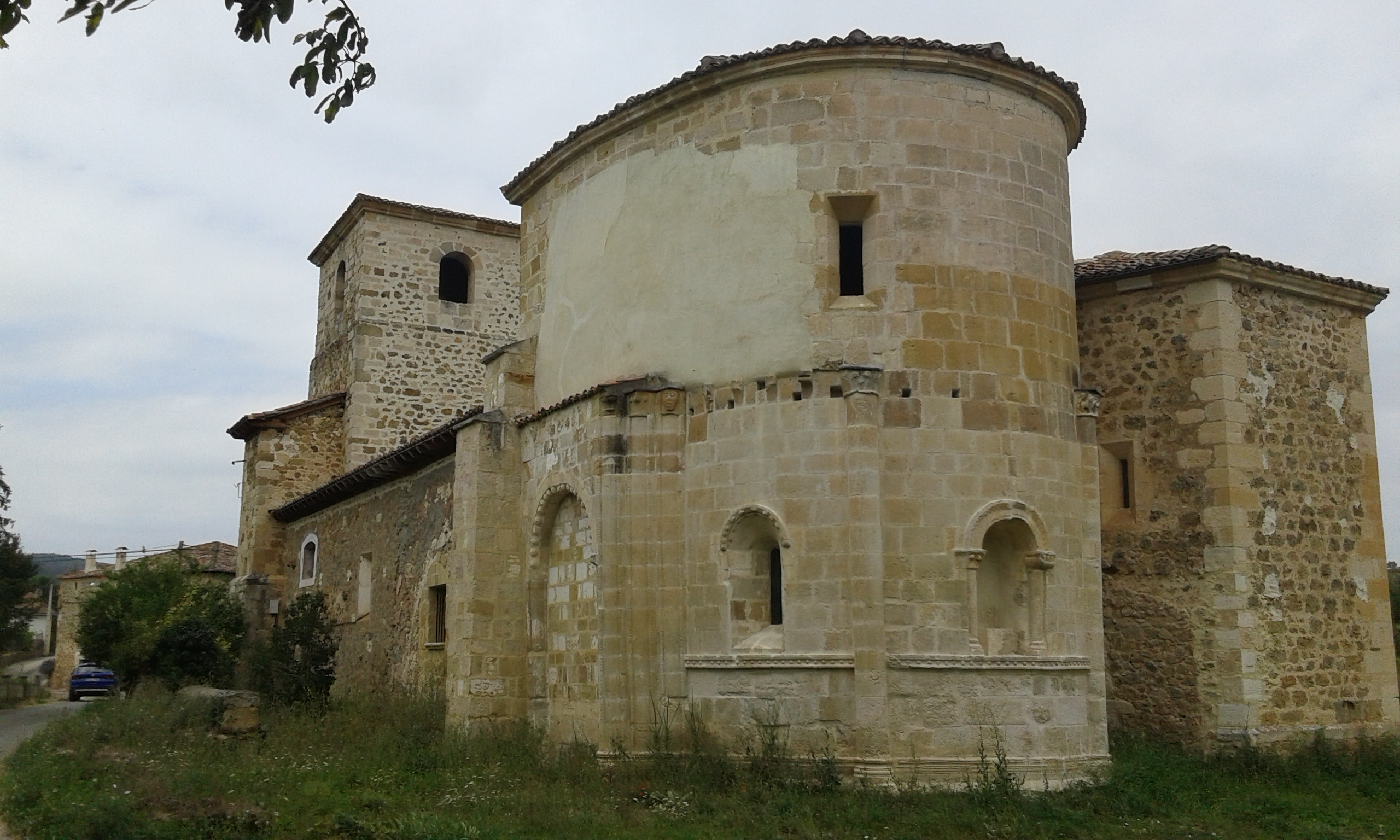 Iglesia parroquial de la localidad